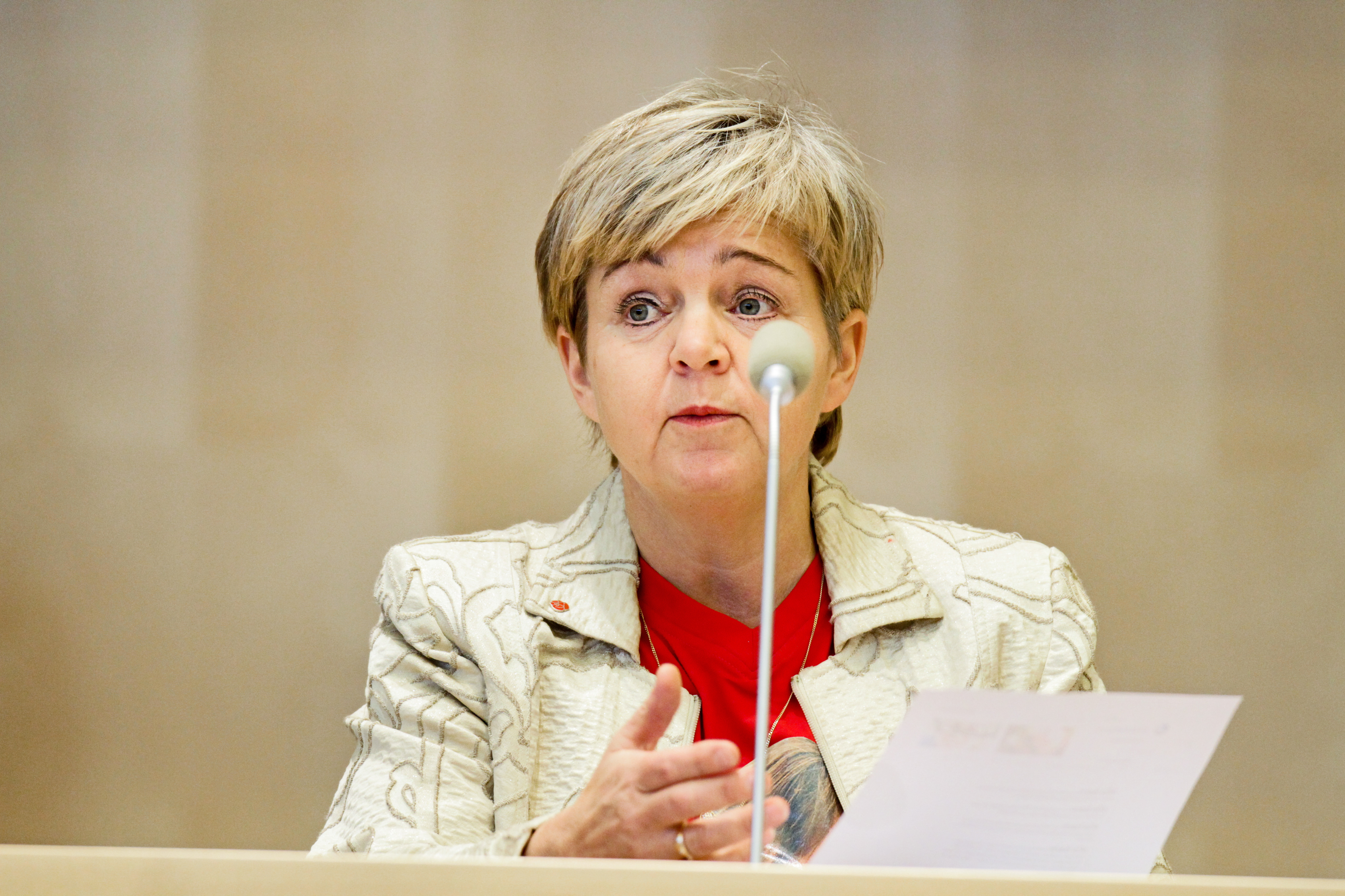 Monica Green (s) vid Nordiska Rådets session i Stockholm 2009.